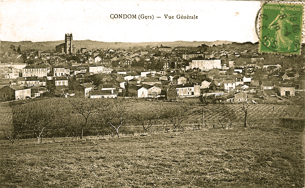 Vignoble de Condom en 1918